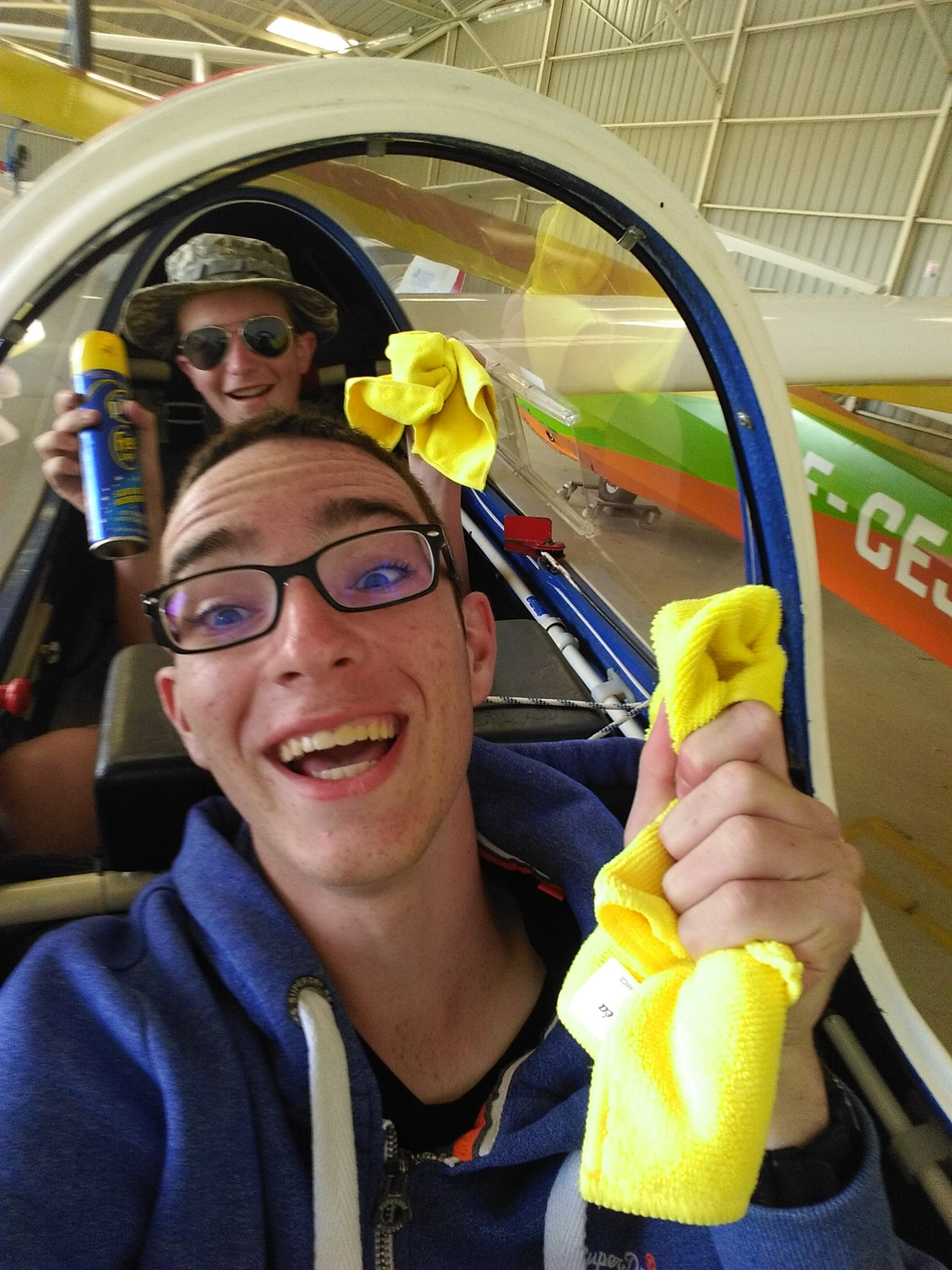 Deux vélivoles bretons netoyant un planeur avec du Pliz.